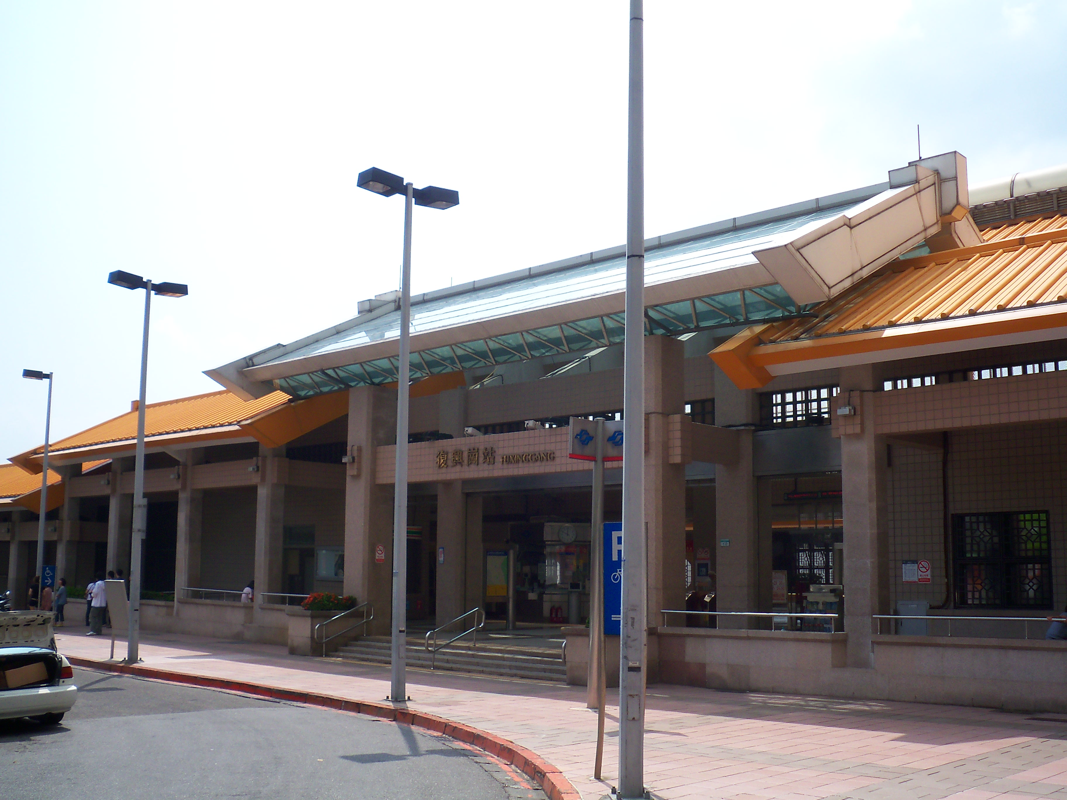 台北捷運復興崗站1號出口。